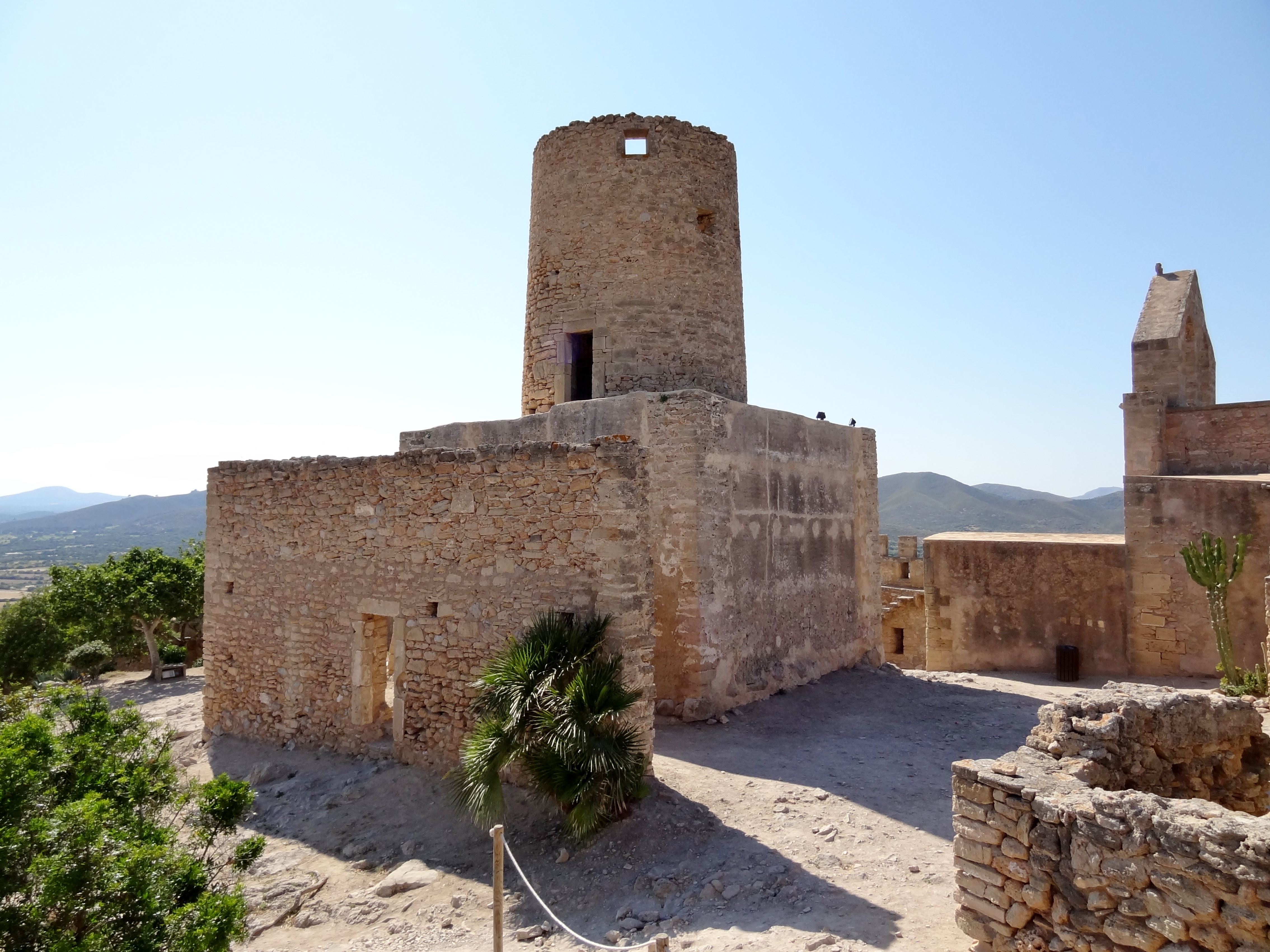 Castell de Capdepera, Gemeinde Capdepera, Mallorca, Spanien